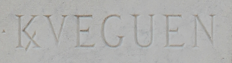 Détail du tombeau de Louis-Marie-Gabriel Le Coat de Kerveguen